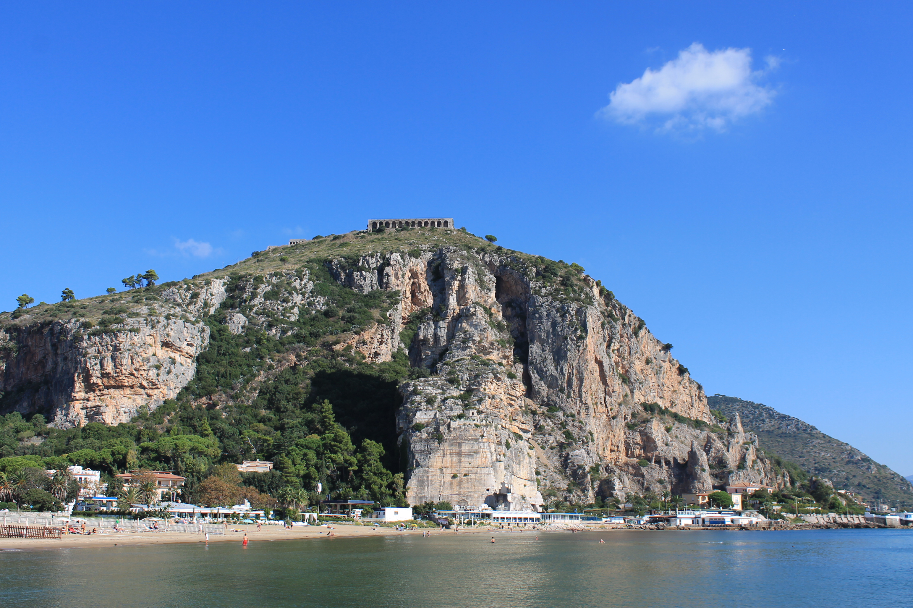 Monte Sant'Angelo (veduta d'insieme) This is a photo of a monument which is part of cultural heritage of Italy.